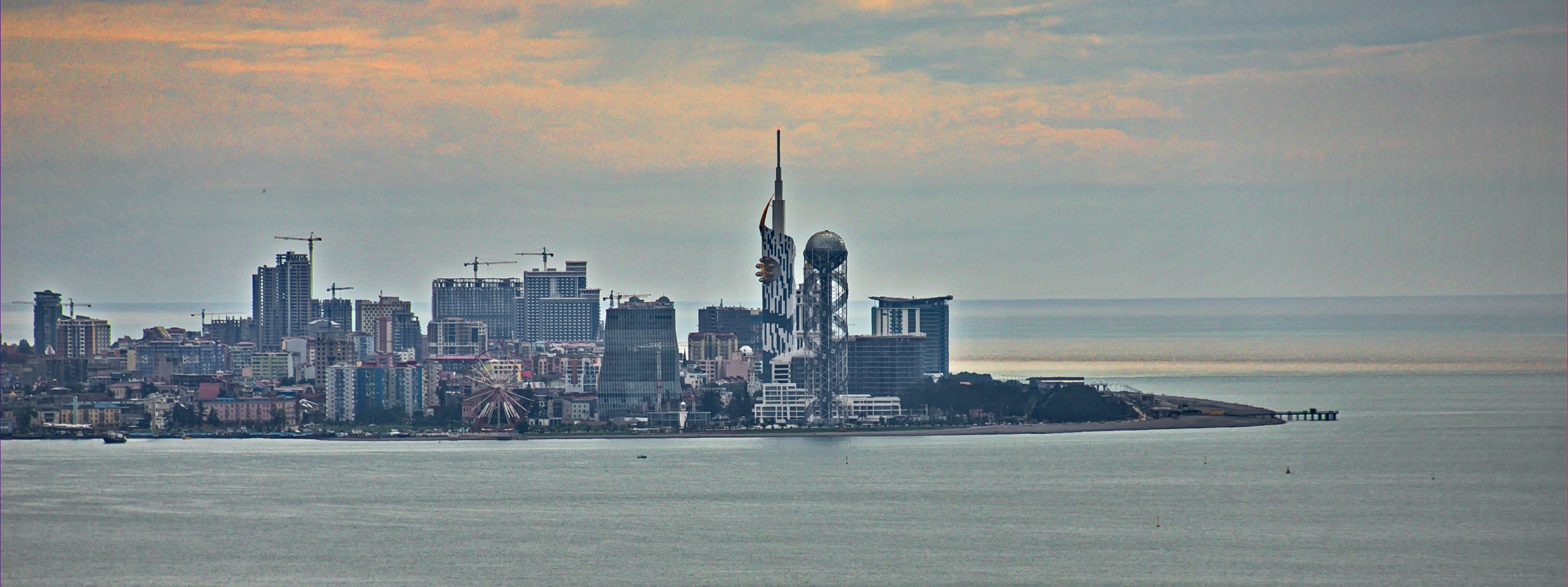 0873 - Kaukasus 2014 - Georgien - Batumi